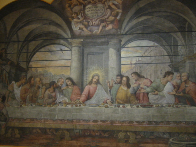 La Cène de Giovanni Mauro Della Rovere (1626) hommage à celle de Léonard de Vinci - Galerie Léonard de Vinci - Musée des sciences et technologies Léonard de Vinci de Milan - Italie